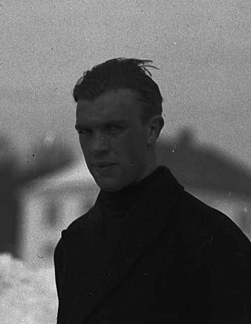 Skøyteløper ARMAND CARLSEN, HAMAR STADION